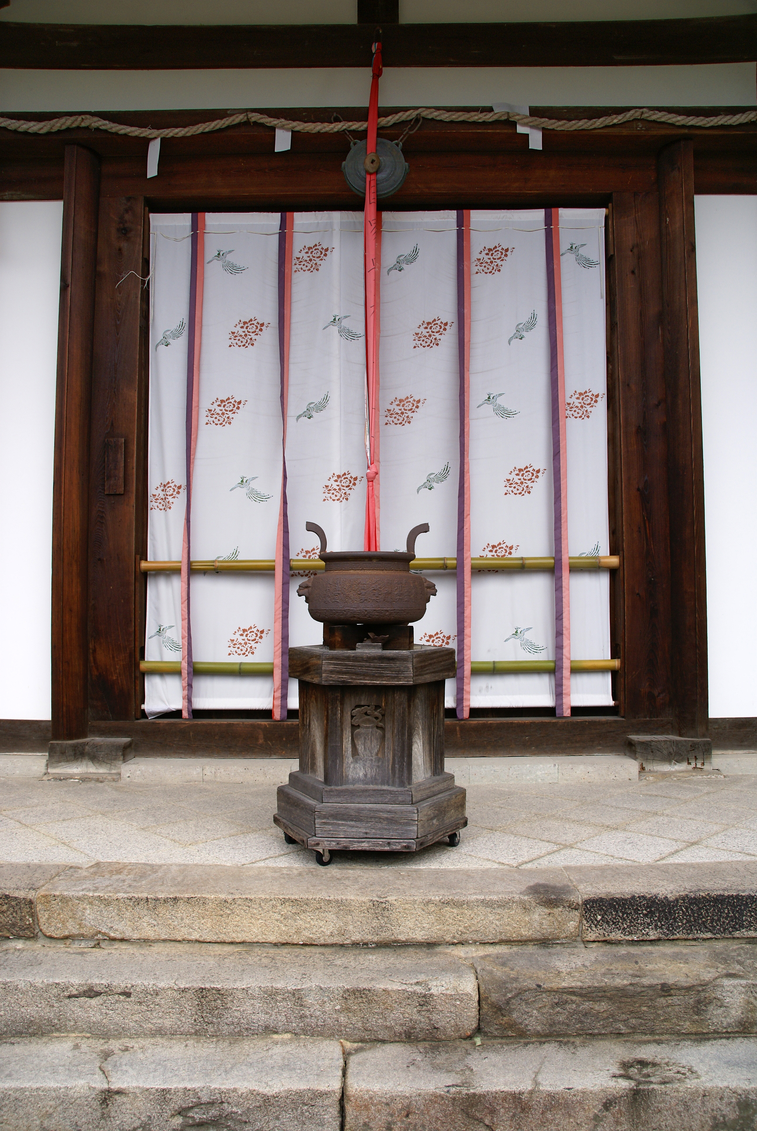 Shin-Yakushiji in Nara, Nara prefecture, Japan